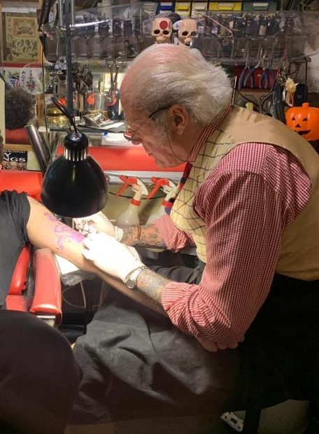 Gian Maurizio Fercioni mentre lavora nel suo studio